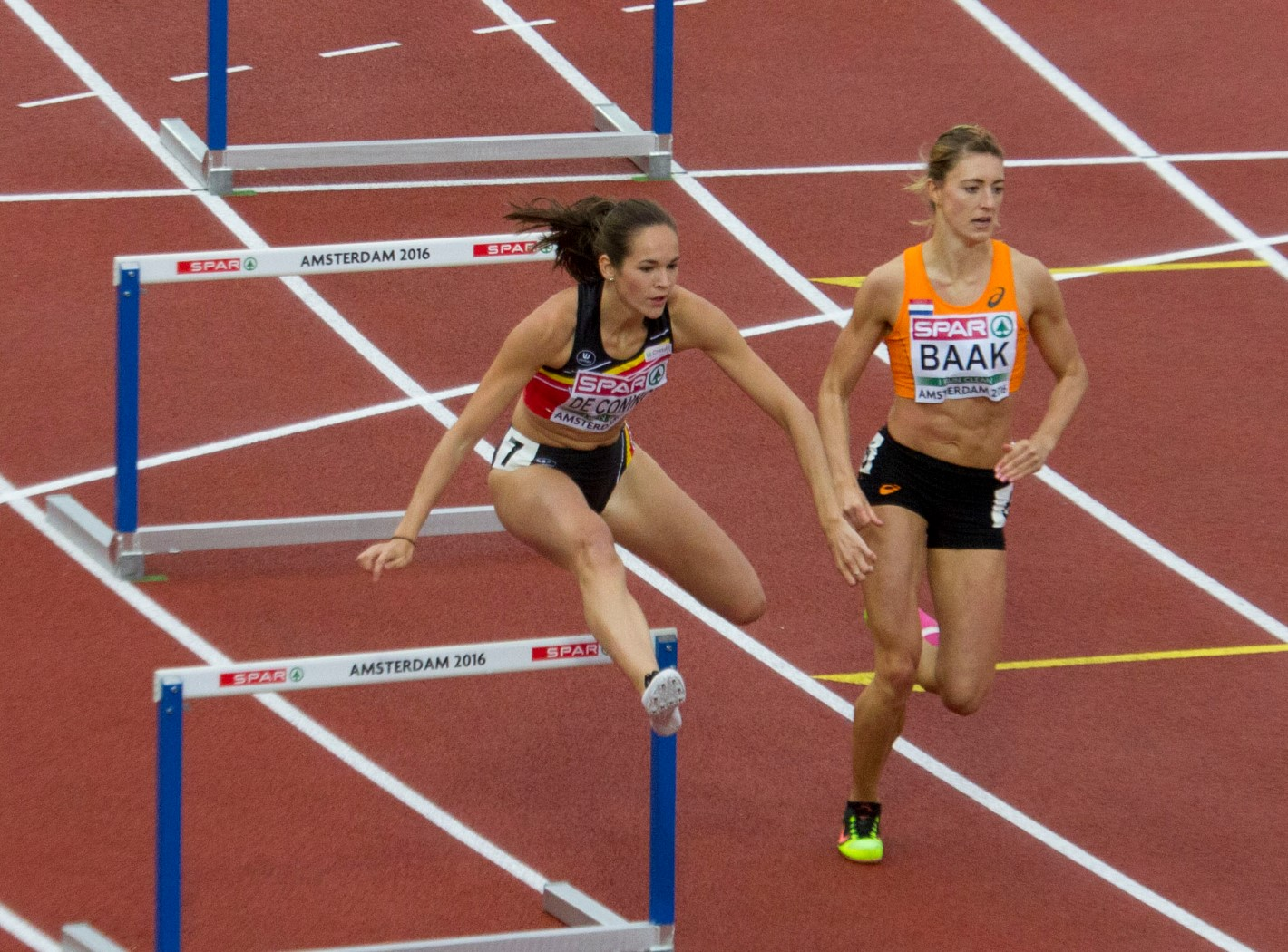 5084 reeksen 400mH dames nenah de coninck